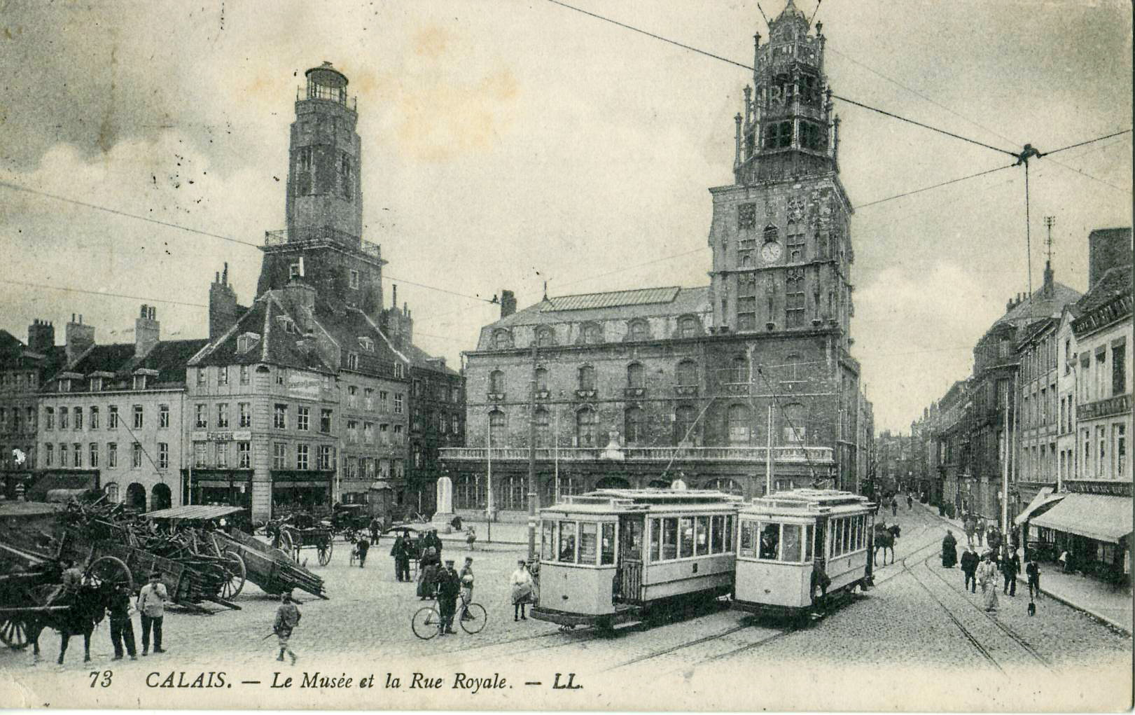 Carte postale ancienne éditée par LL, n°73 :CALAIS - Le Musée et la Rue RoyaleCroisement de deux motrices du Tramway de Calais